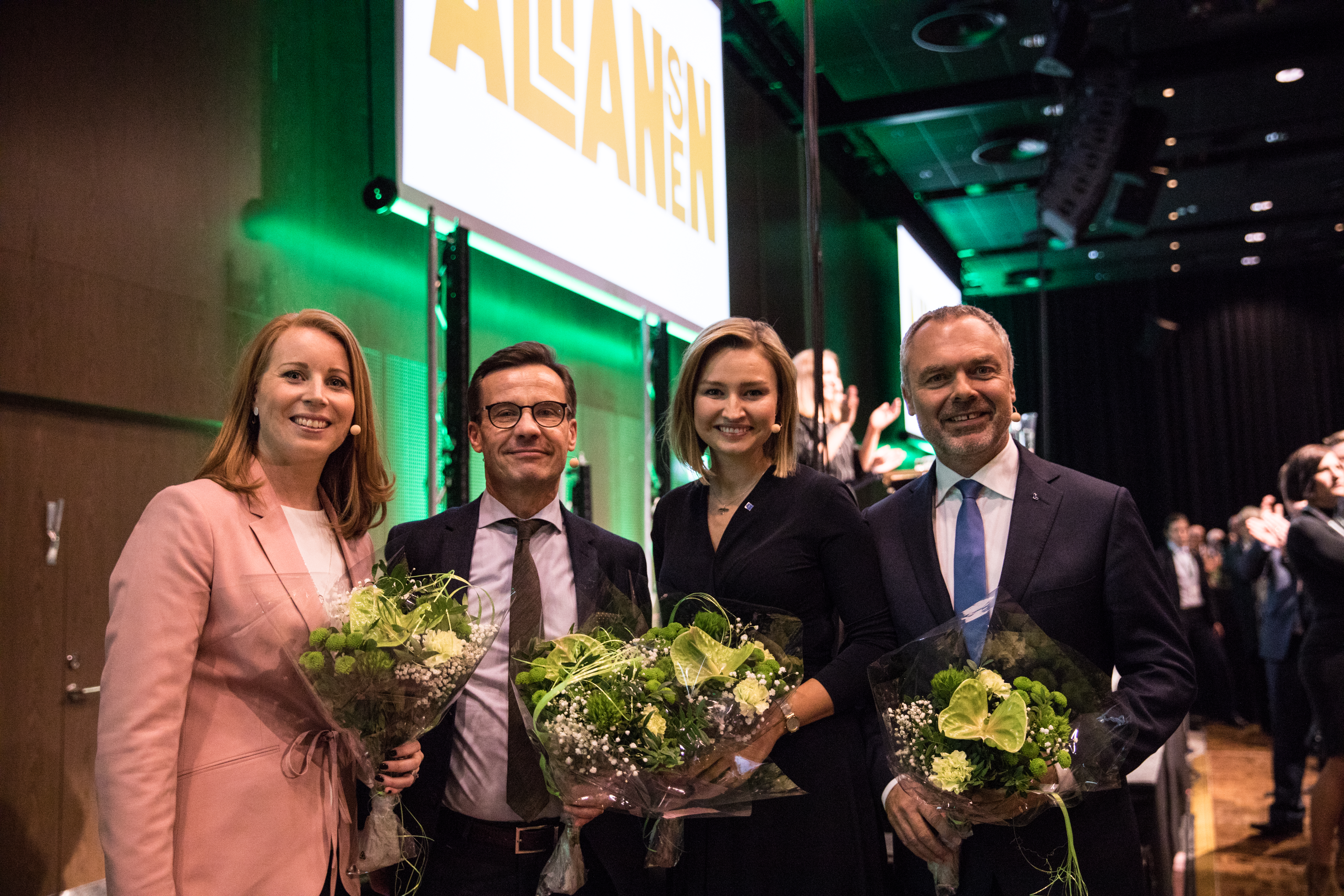 Centerpartiets kommundagar 2018